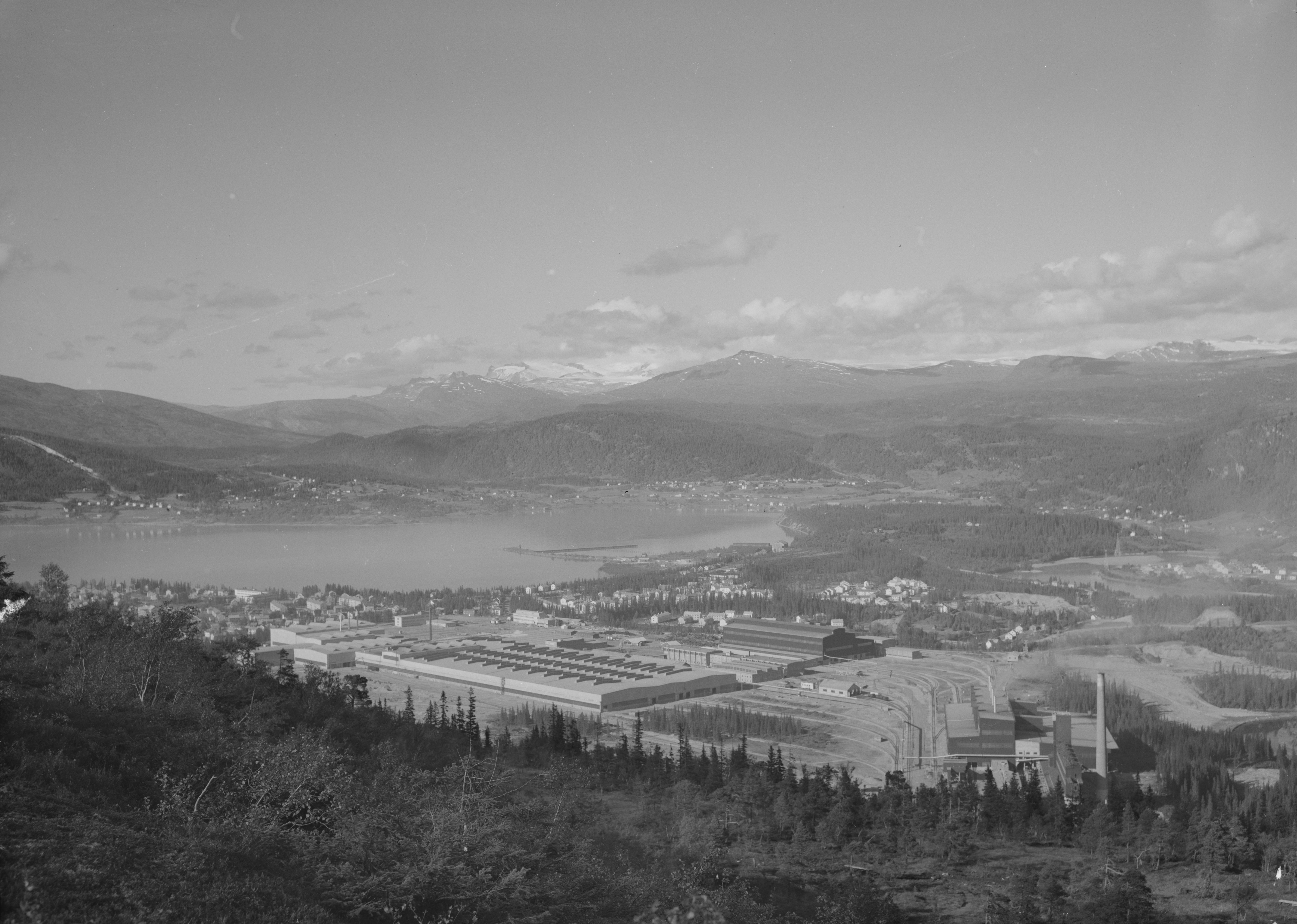 Bildet er hentet fra Nasjonalbibliotekets bildesamling. Anmerkninger til bildet var: Fotograf: L.S Båsmoen, Mo i Rana, Ytteren, Rana, Nordland